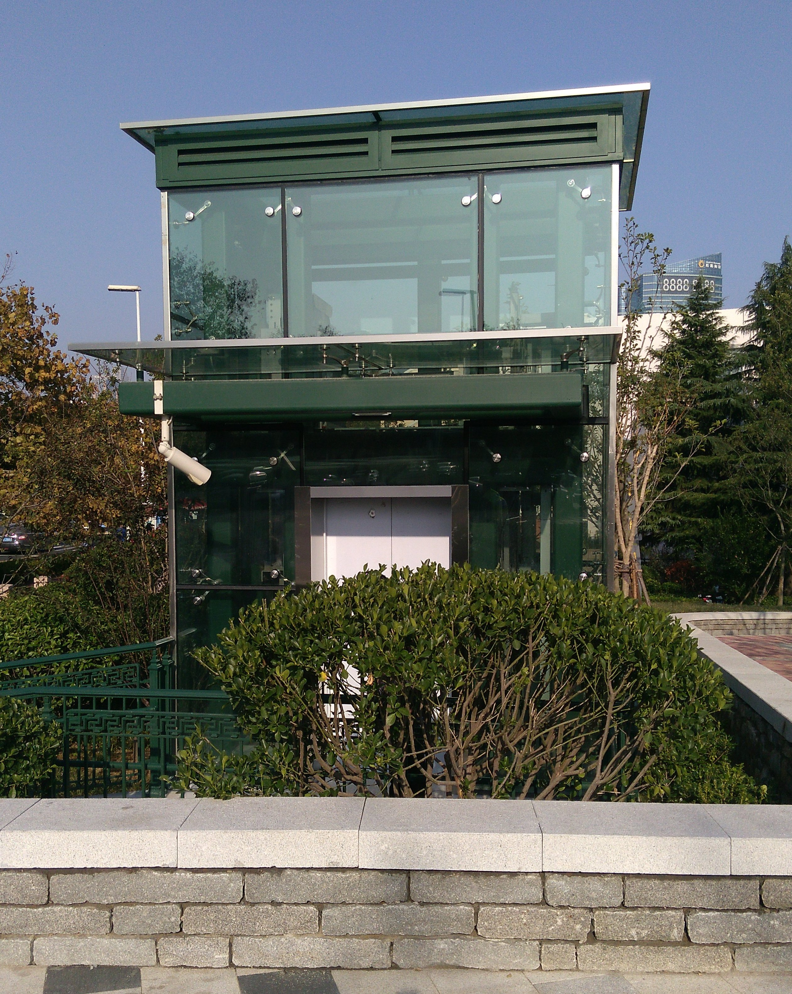 青岛地铁太平角公园A口直梯